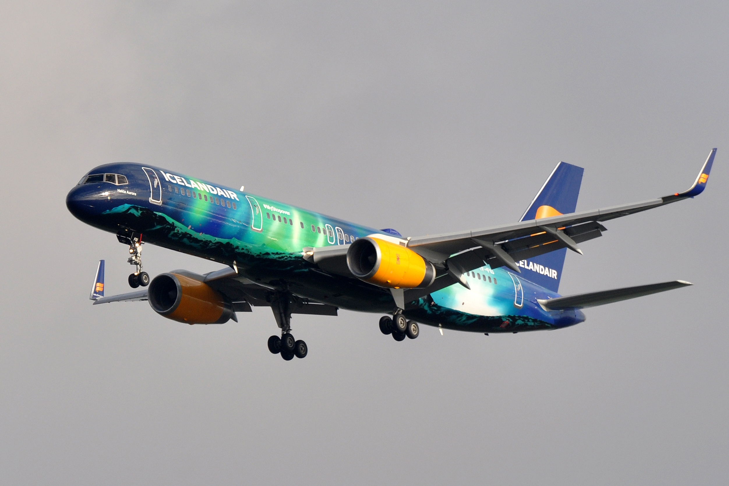 MSN 26243 LN 603 B757-256 ICELANDAIR CDG EX IBERIA AS EC-609 AND EC-FYK EX VOLARE AIRLINES AS TF-FIU